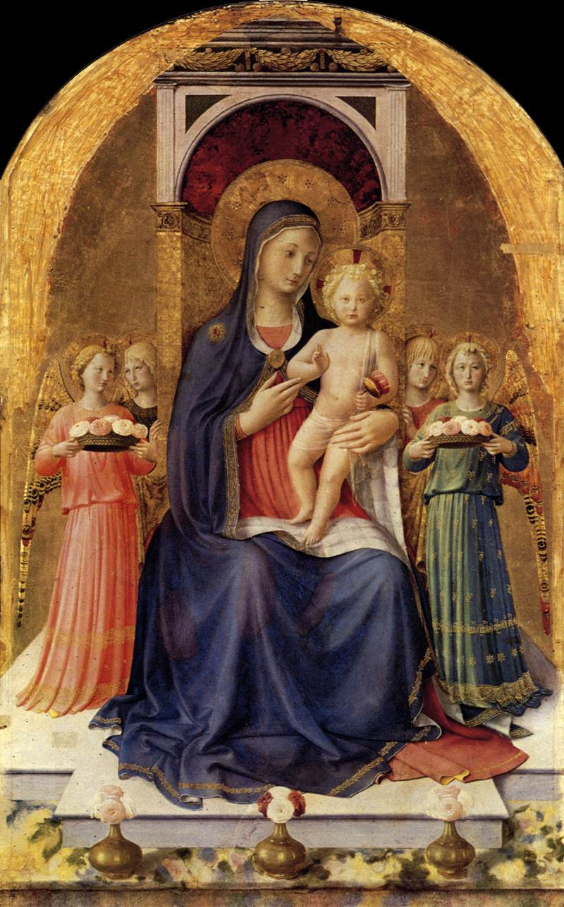 Sacra Conversazione Fresco, 195 x 273 cm